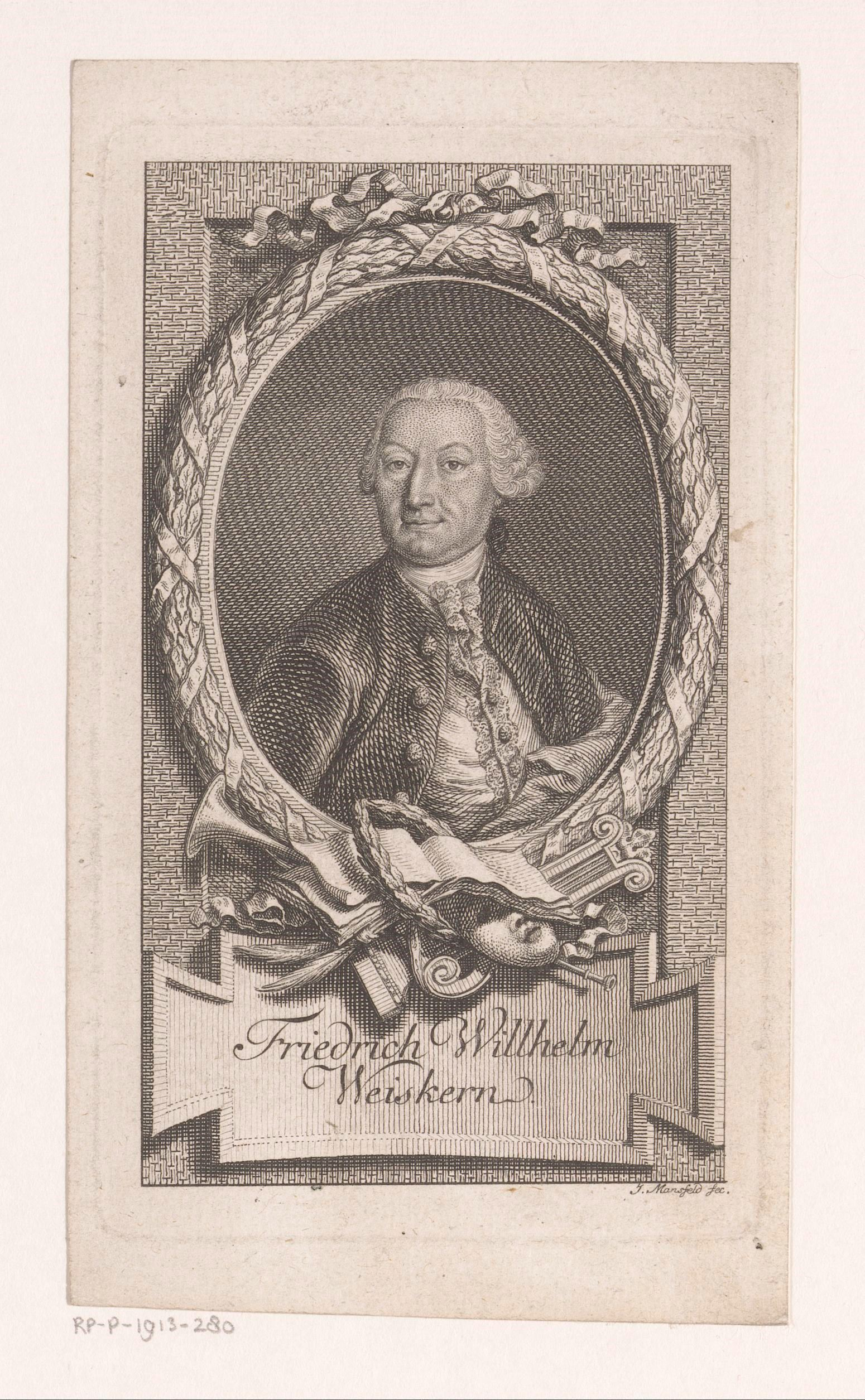 IdentificatieTitel(s): Portret van Friedrich Wilhelm WeiskernObjecttype: prent Objectnummer: RP-P-1913-280Catalogusreferentie: HAB A 23523Opschriften / Merken: verzamelaarsmerk, verso, gestempeld: Lugt 2228VervaardigingVervaardiger: prentmaker: Johann Ernst Mansfeld (vermeld op object)Datering: 1778Fysieke kenmerken: ets en gravureMateriaal: papier Techniek: graveren (drukprocedé) / etsenAfmetingen: prent: h 158 mmplaatrand: b 94 mmToelichtingGebruikt als illustratie in: Weiskern, Friedrich Wilhelm: Topographie von Niederösterreich. Wie: n: Johann Georg Weingand 1778.OnderwerpWat: historical personsWieFriedrich Wilhelm WeiskernVerwerving en rechtenVerwerving: aankoop 1905Copyright: Publiek domein